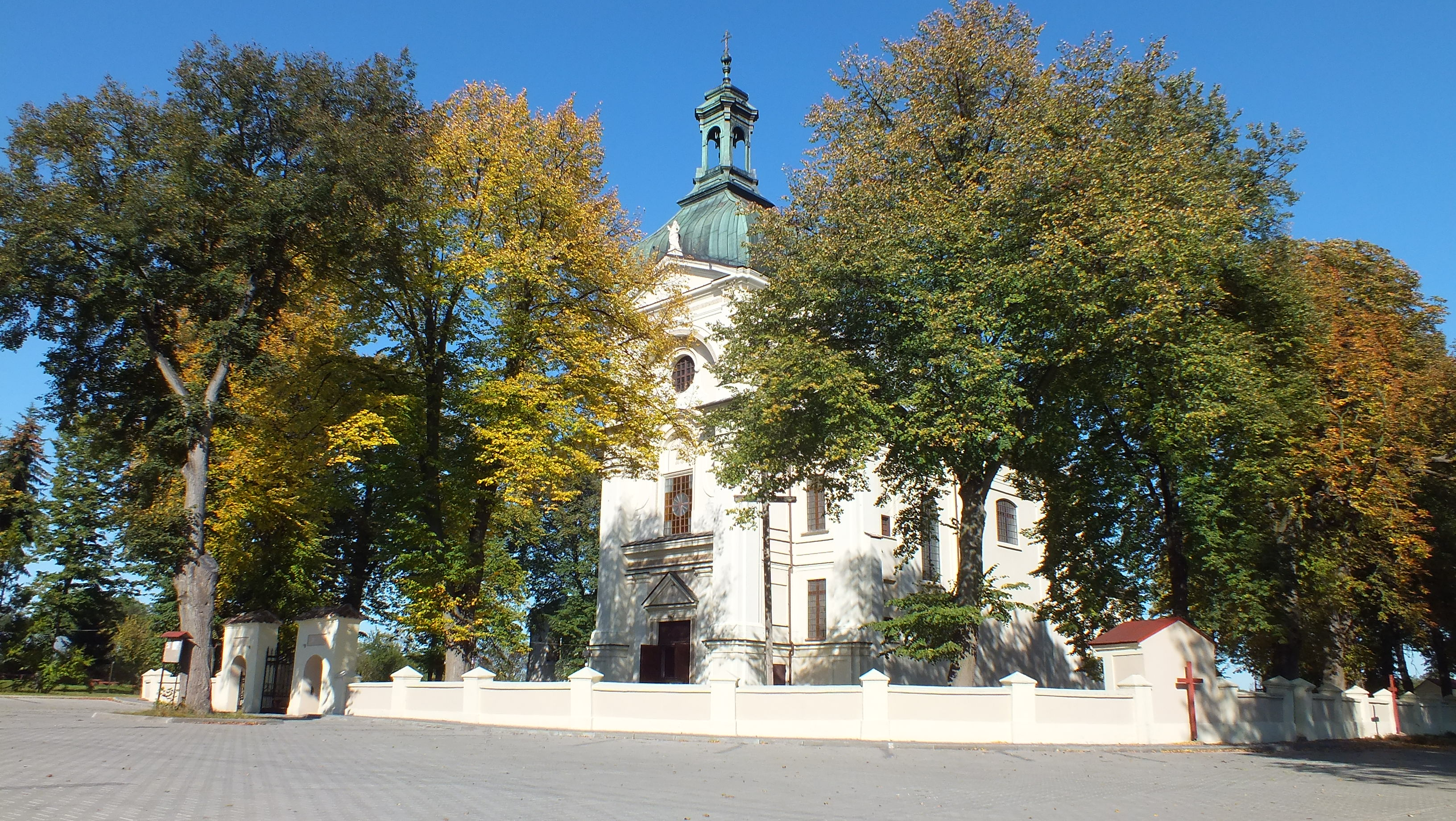 Kościół par. p.w. Marii Magdaleny (1759-66) - Ogrodzenie z bramkami, Serniki, pow. lubartowski